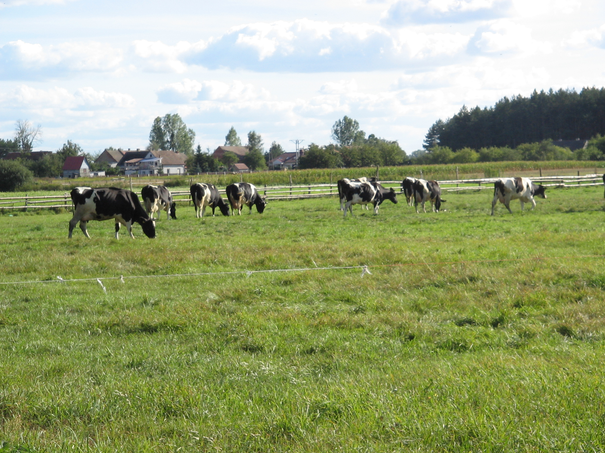 Dziuplina, stado krów